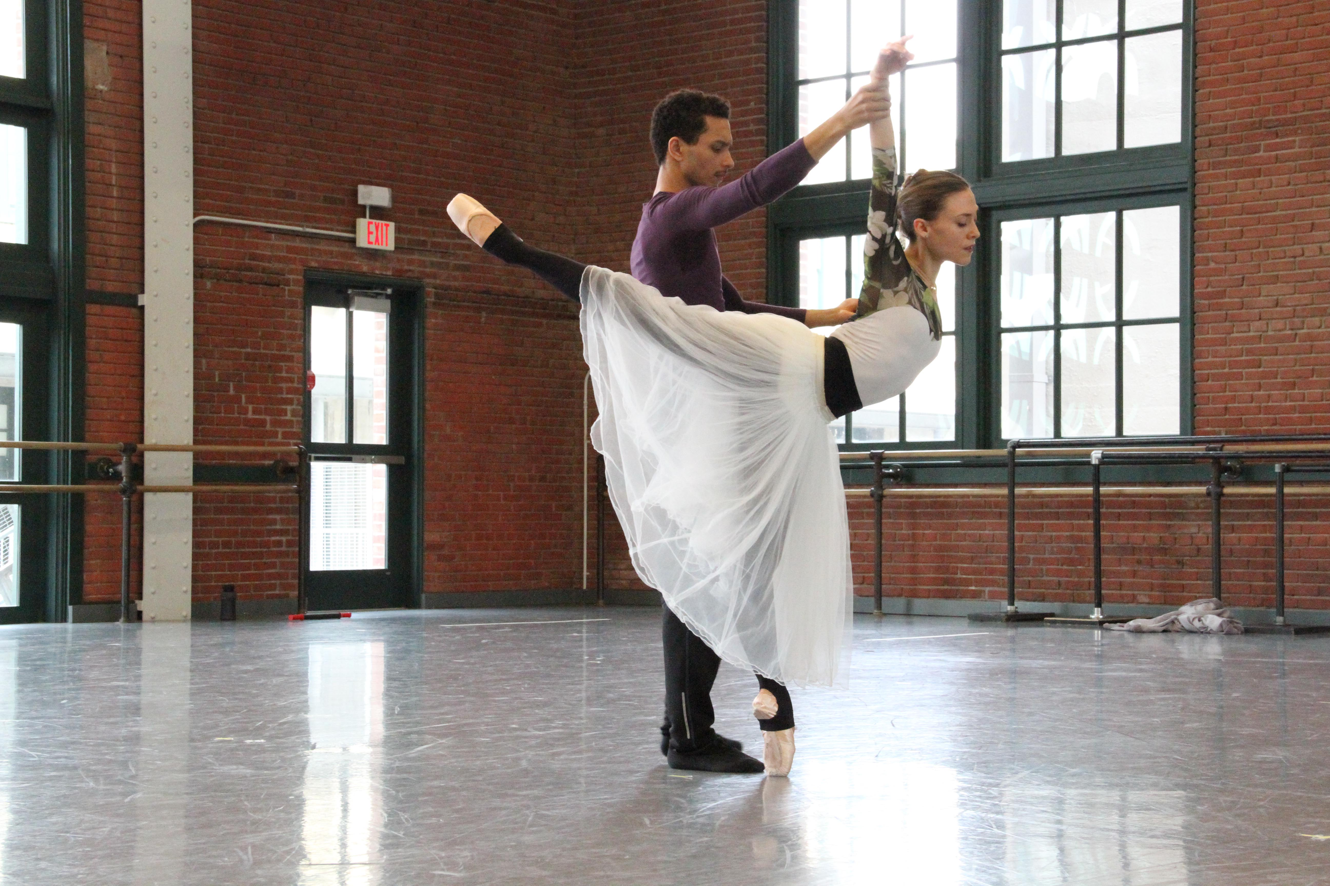 Dancers Tempe Ostergren and Lamin Pereira dos Santos